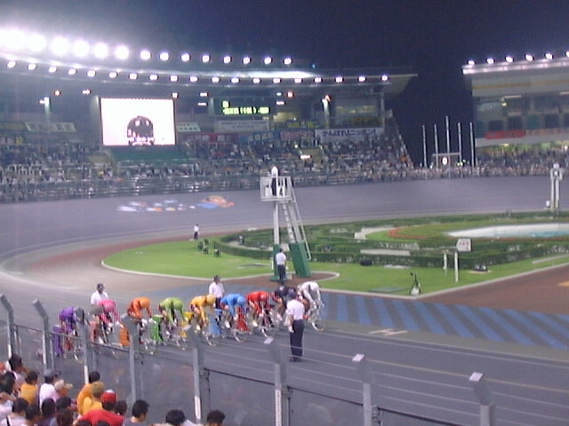 2007年7月21日、松戸競輪場第8R